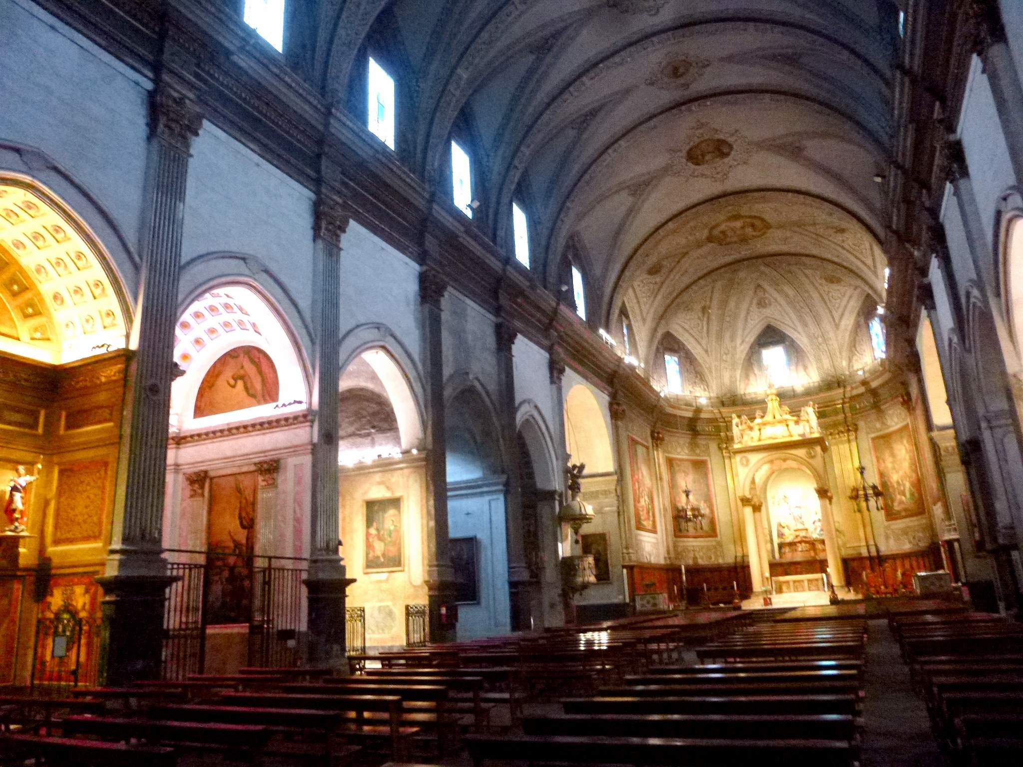 1Basílica de Santa María de Mataró (provincia de Barcelona).